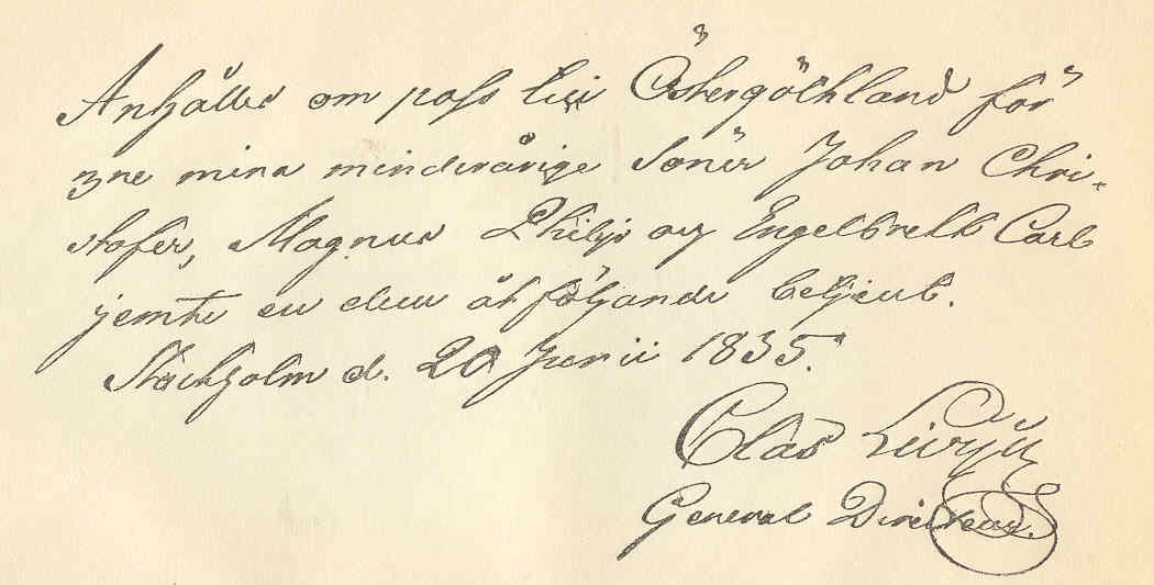 Facsimile av Clas Livijns handstil och namnteckning. En betecknande tidsbild från den tid, då passtvånget gällde för alla, även vid resa från ett län till ett annat. Denna bild hittas i Mila Hallmans Livijn-studie från år 1909 och texten lyder: "Anhåller om pass till Östergöthland för 3ne mina minderårige söner Johan Christofer, Magnus Philip och Engelbrekt Carl jemte en dem åtföljande betjent. Stockholm d. 20 Junii 1835. Clas Livijn General Directeur." Uppgiftslämnare: Harri Blomberg 2004-08-22.